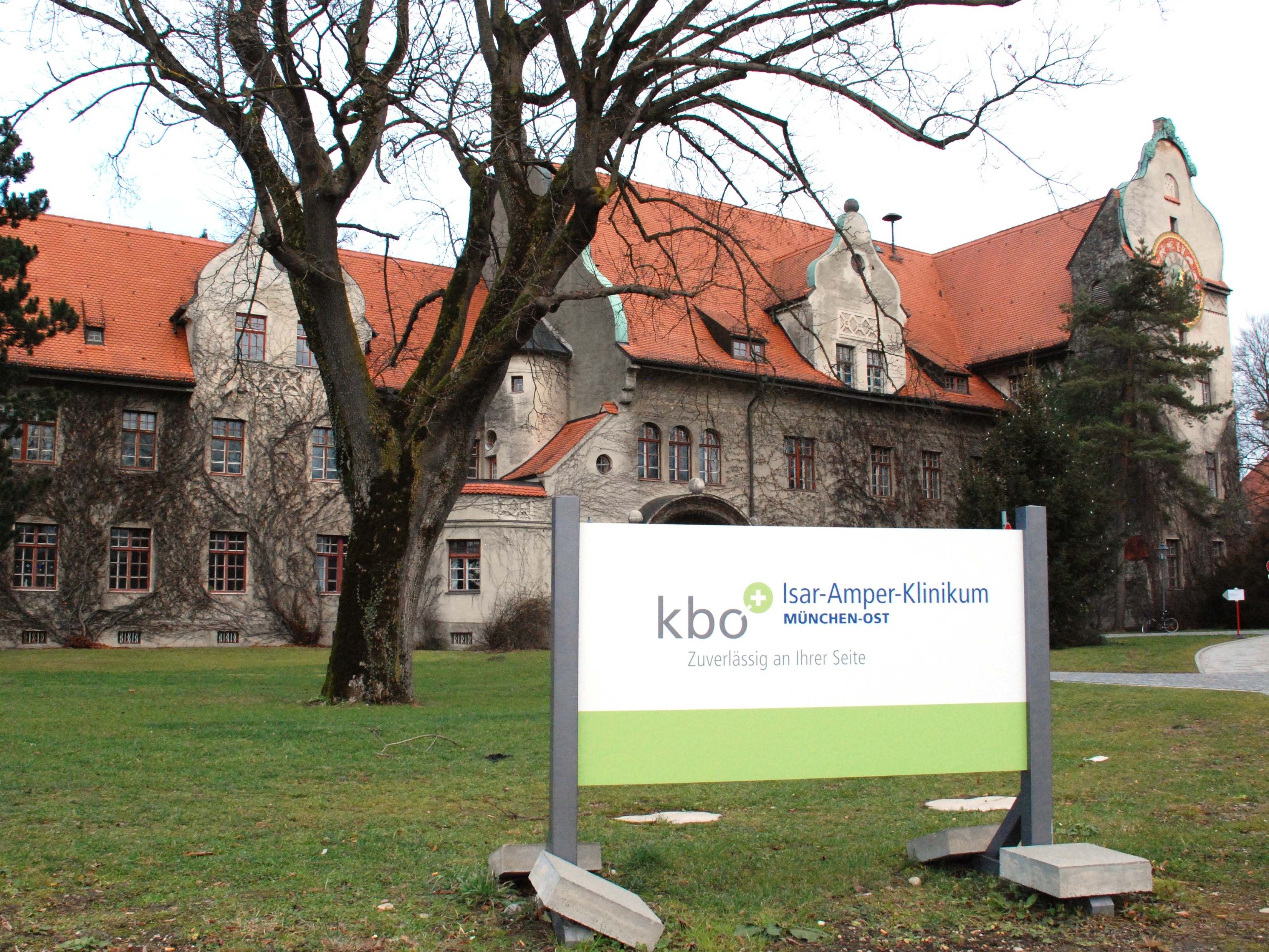 Einfahrtsschild und Direktionsgebäude (Haus V72) des kbo Isar-Amper-Klinikums München-Ost (zuvor Bezirkskrankenhaus Haar, davor Kreis-Heil- und Pflegeanstalt Haar). Als Baudenkmal unter Aktennummer D-1-84-123-9 in der Bayerischen Denkmalliste aufgeführt. Laut Denkmalliste erbaut nach Plänen von Gabriel von Seidl. Gesamtanlage auf der Planungsgrundlage des Psychiaters Friedrich Vocke weitgehend durch Carl Freiherr von Harsdorf (Bamberg) und Adolf Stauffer (Rosenheim) errichtet in den Jahren 1901 bis 1905.